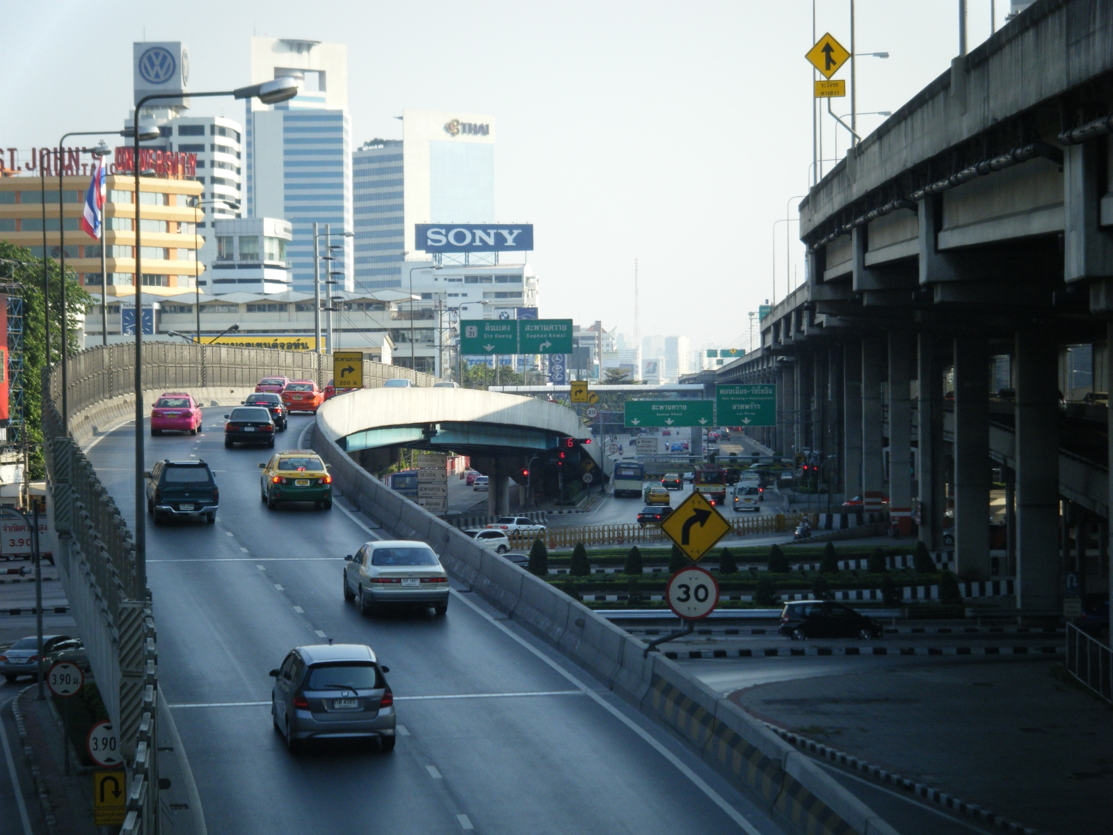 Lat Phrao